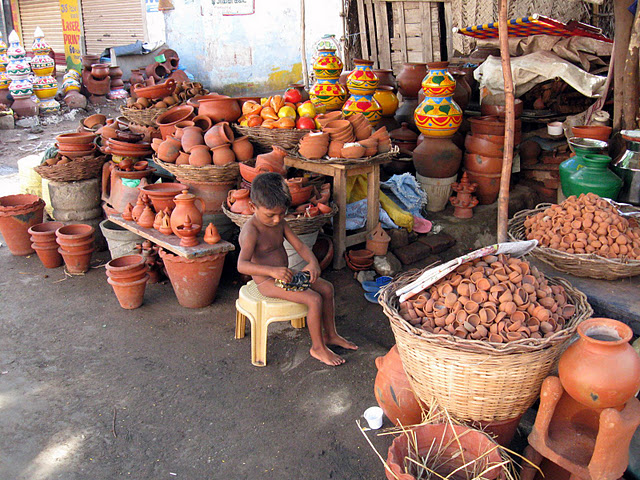 தெருவோரம் இருக்கும் ஒரு மட்பாண்டக் கடையில் ஒரு சிறுவன் அமர்ந்திருக்கும் காட்சி.